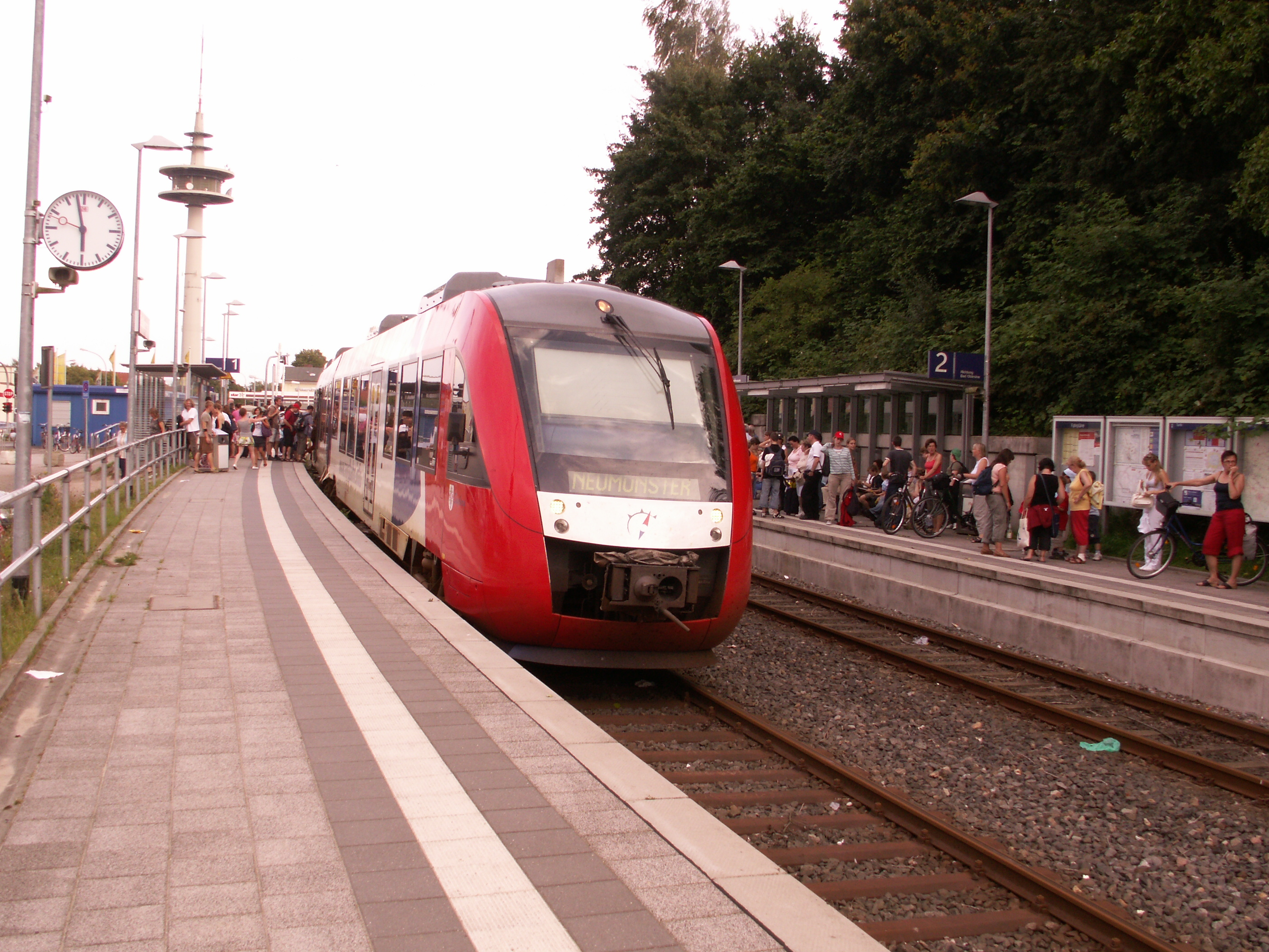 Bf segeberg